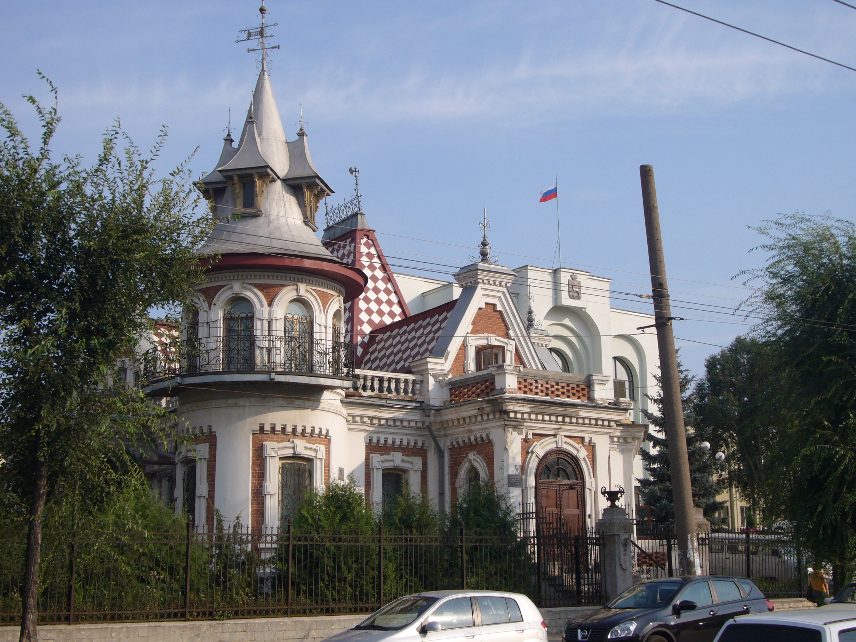 Особняк инженера Ивана Андреевича Клодта